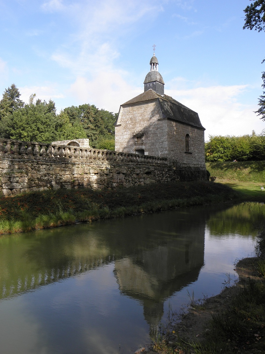 Douves et chapelle de la Sainte-Famille du château de La Haye en Saint-Hilaire-des-Landes (35). .